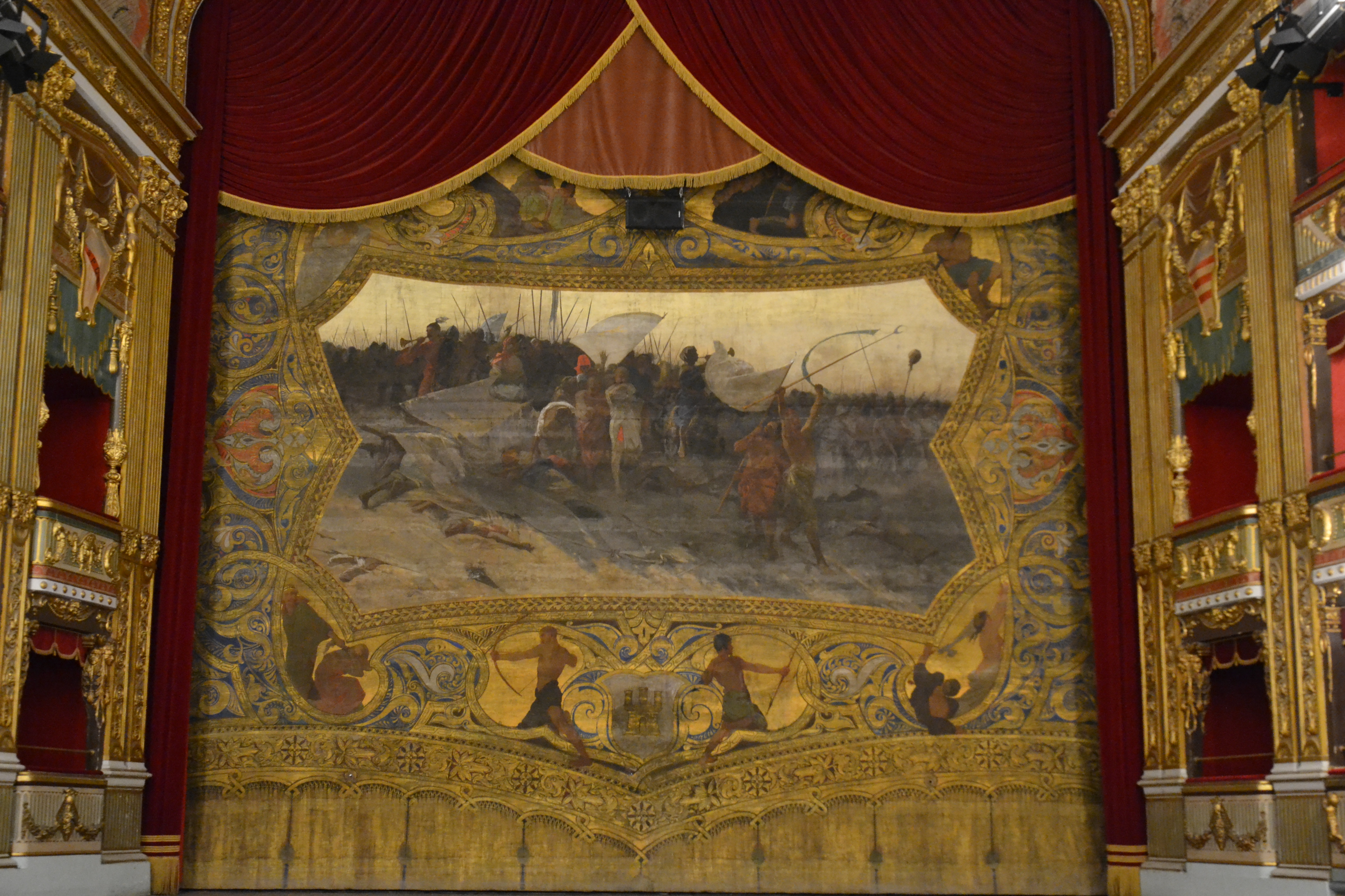 Il sipario del teatro Verdi Salerno